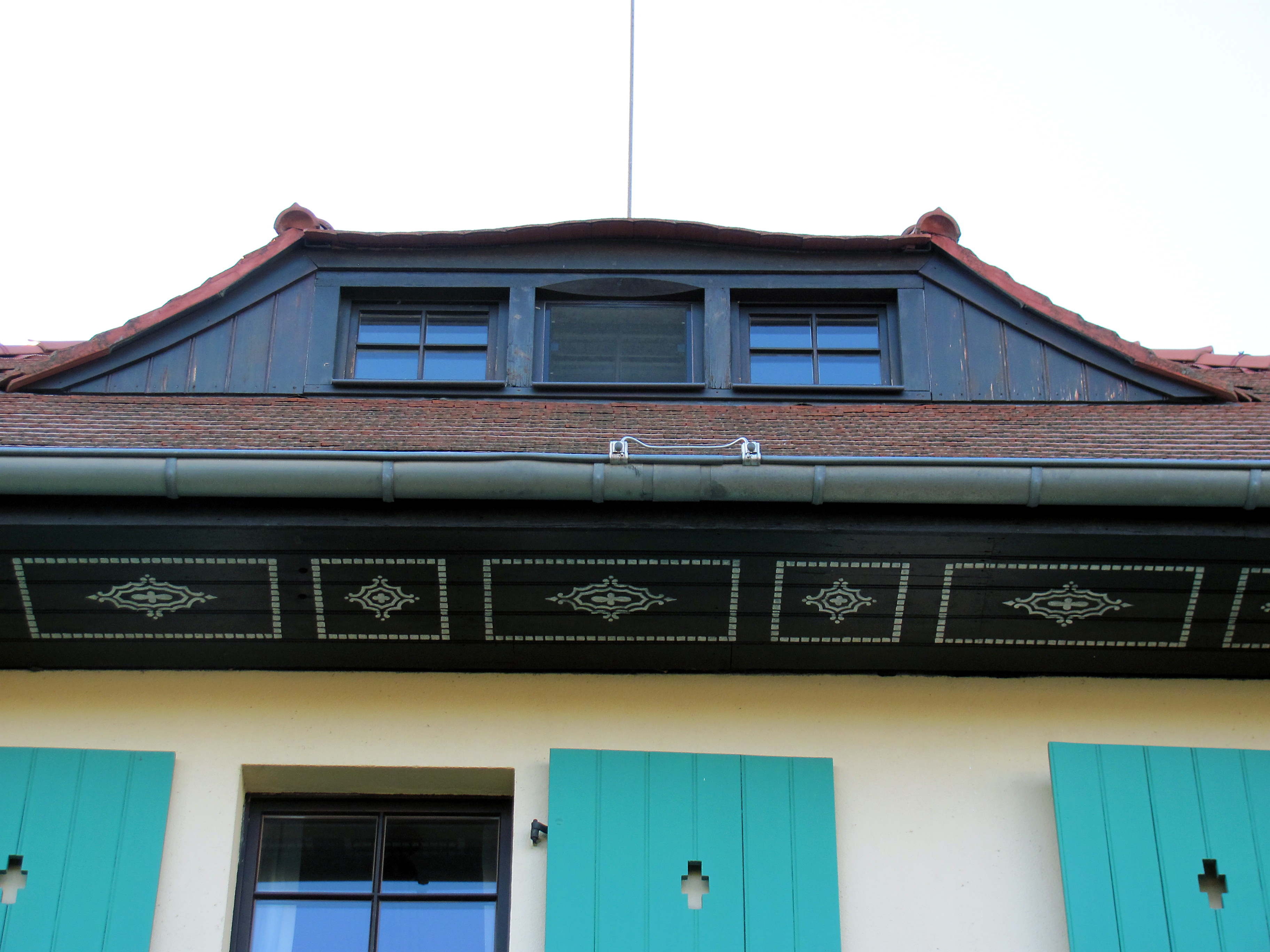 Radebeul-Serkowitz, Landhaus Bernhard Kraetzner, Detail